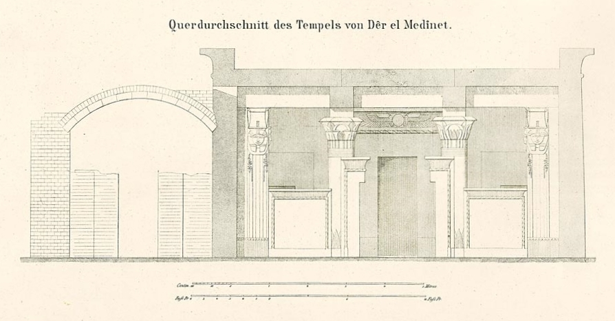 Querschnitt des Tempels von Deir el-Medina, Ägypten